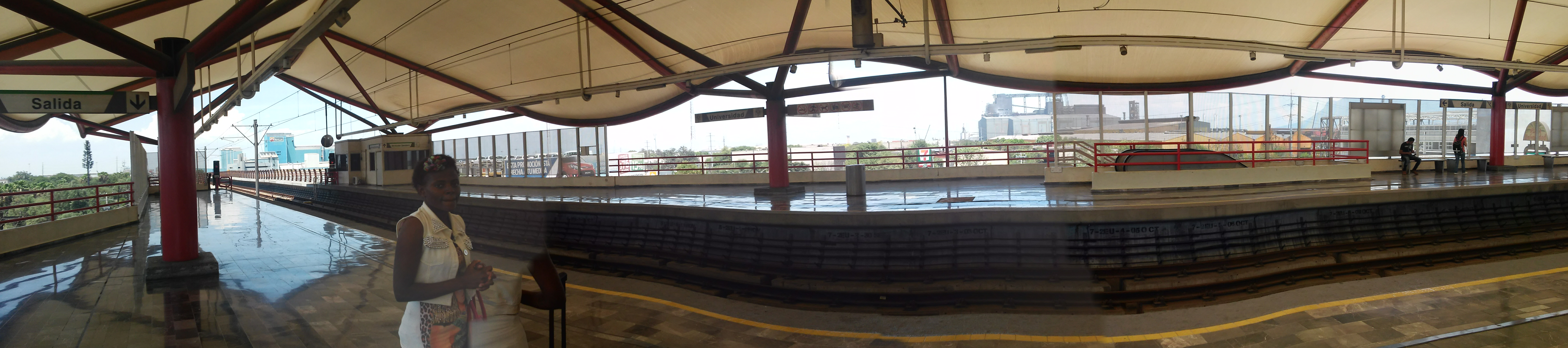 Panoramica